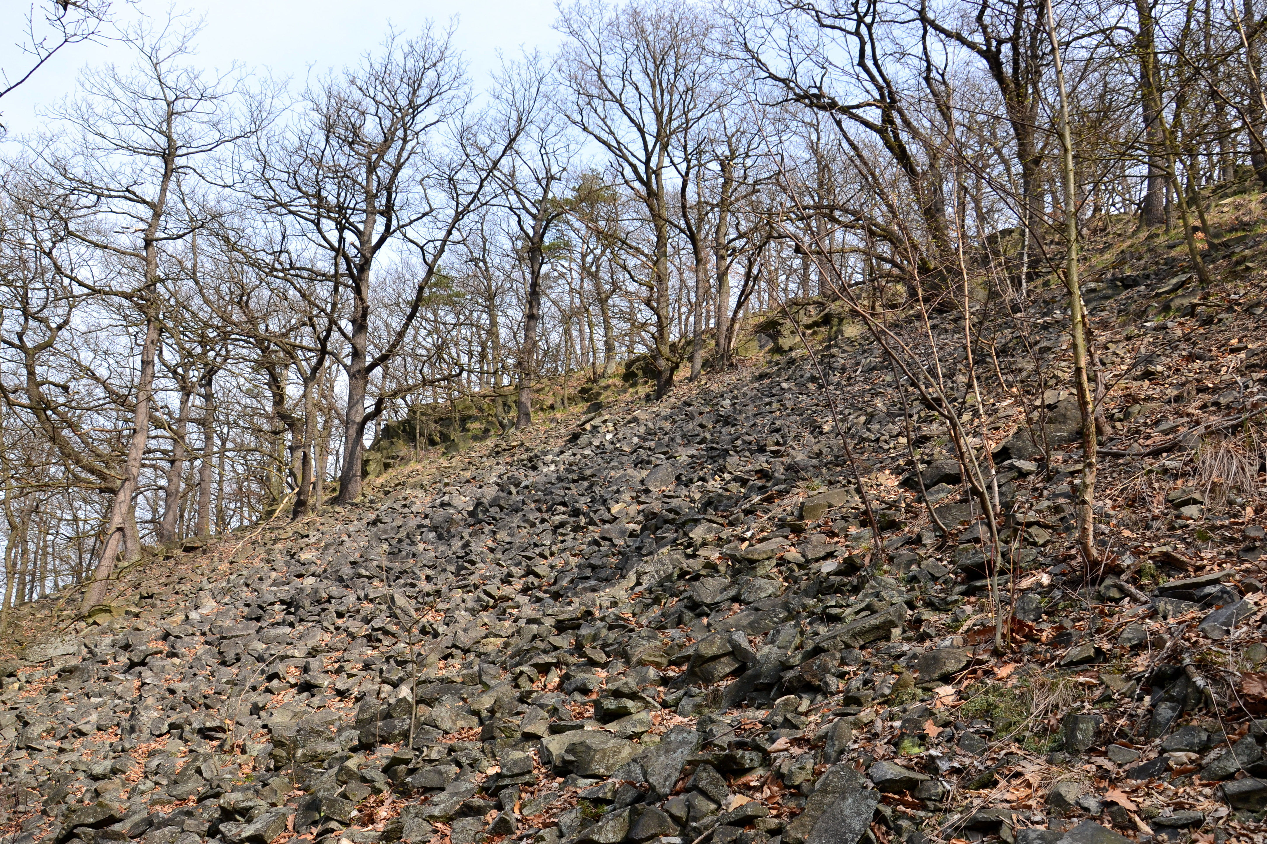 Kamenné moře na úbočí Zámeckého vrchu